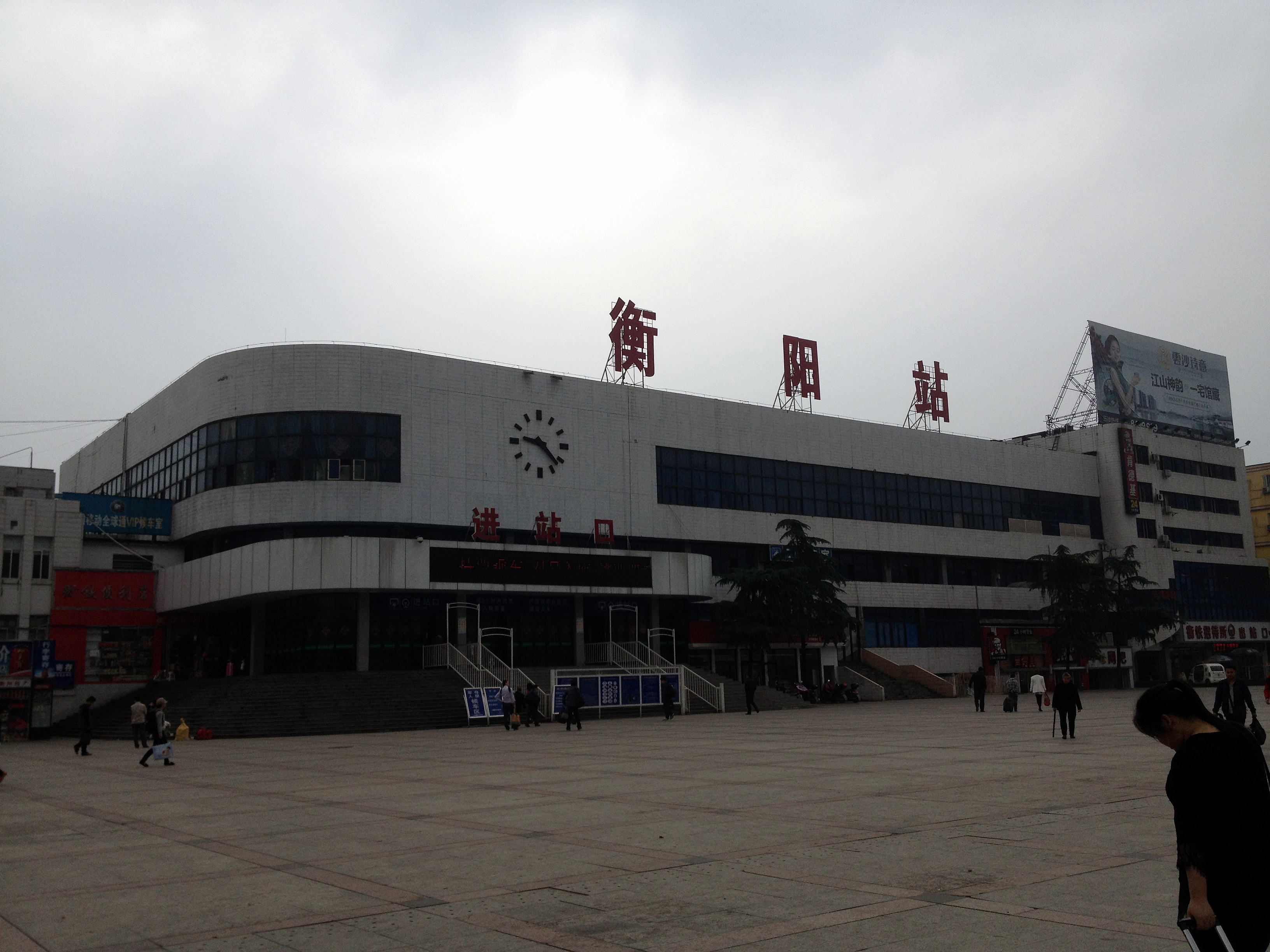 衡阳站外观